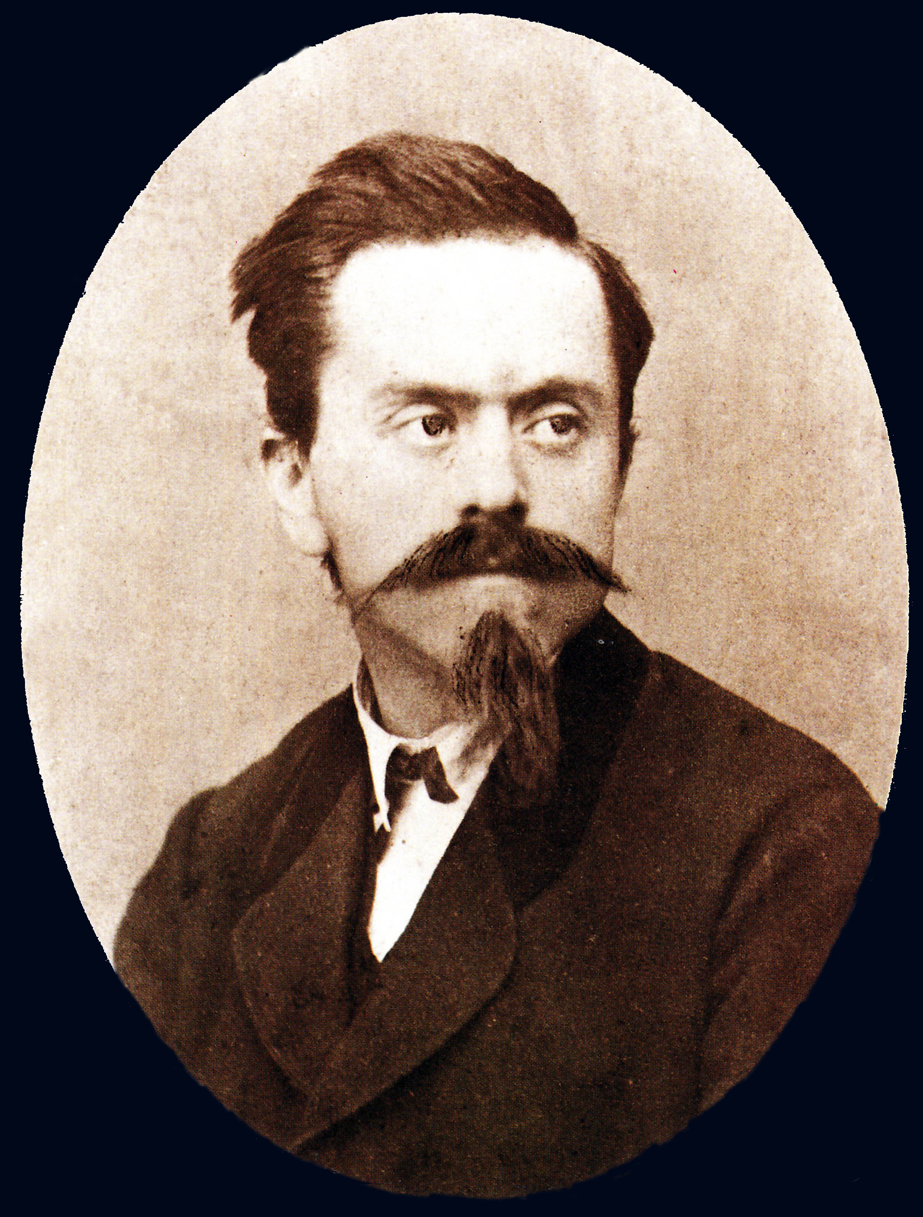 Foto di Tito Chelazzi (1834-1892)